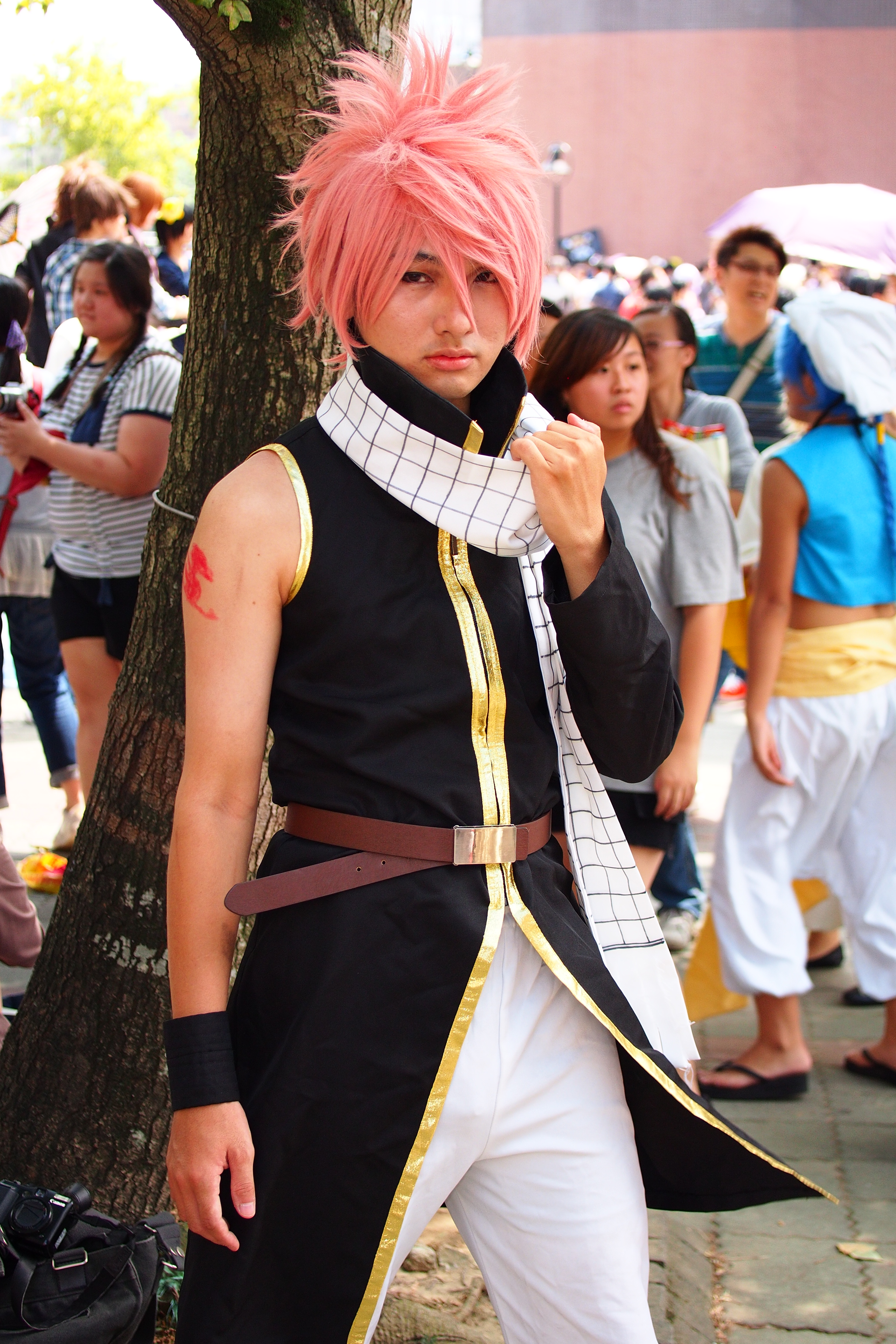 第34屆台灣同人誌販售會，《魔導少年》納茲·多拉格尼爾cosplayer。